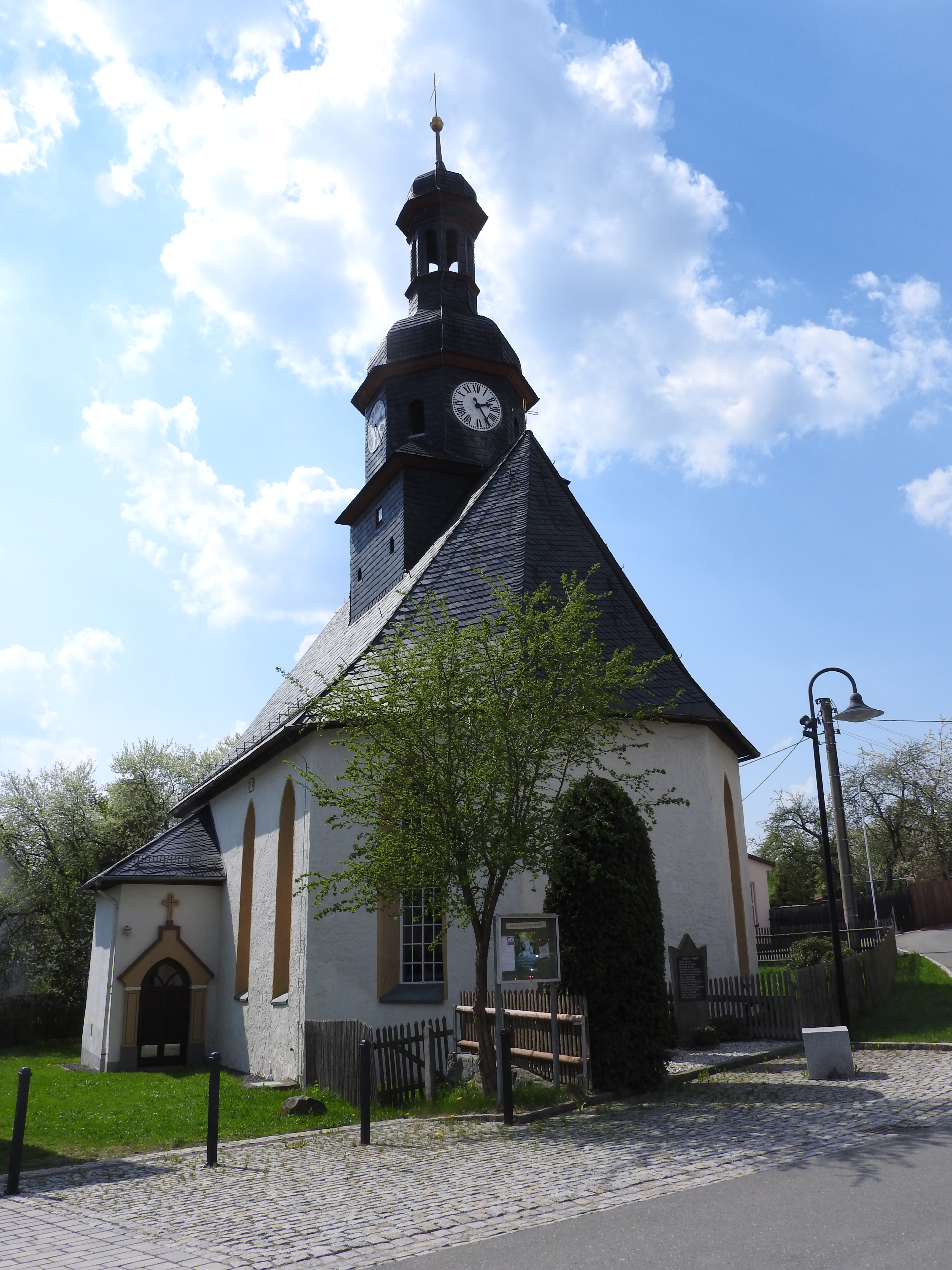 Kirche "St. Martin" in Gräfenwarth, Thüringen